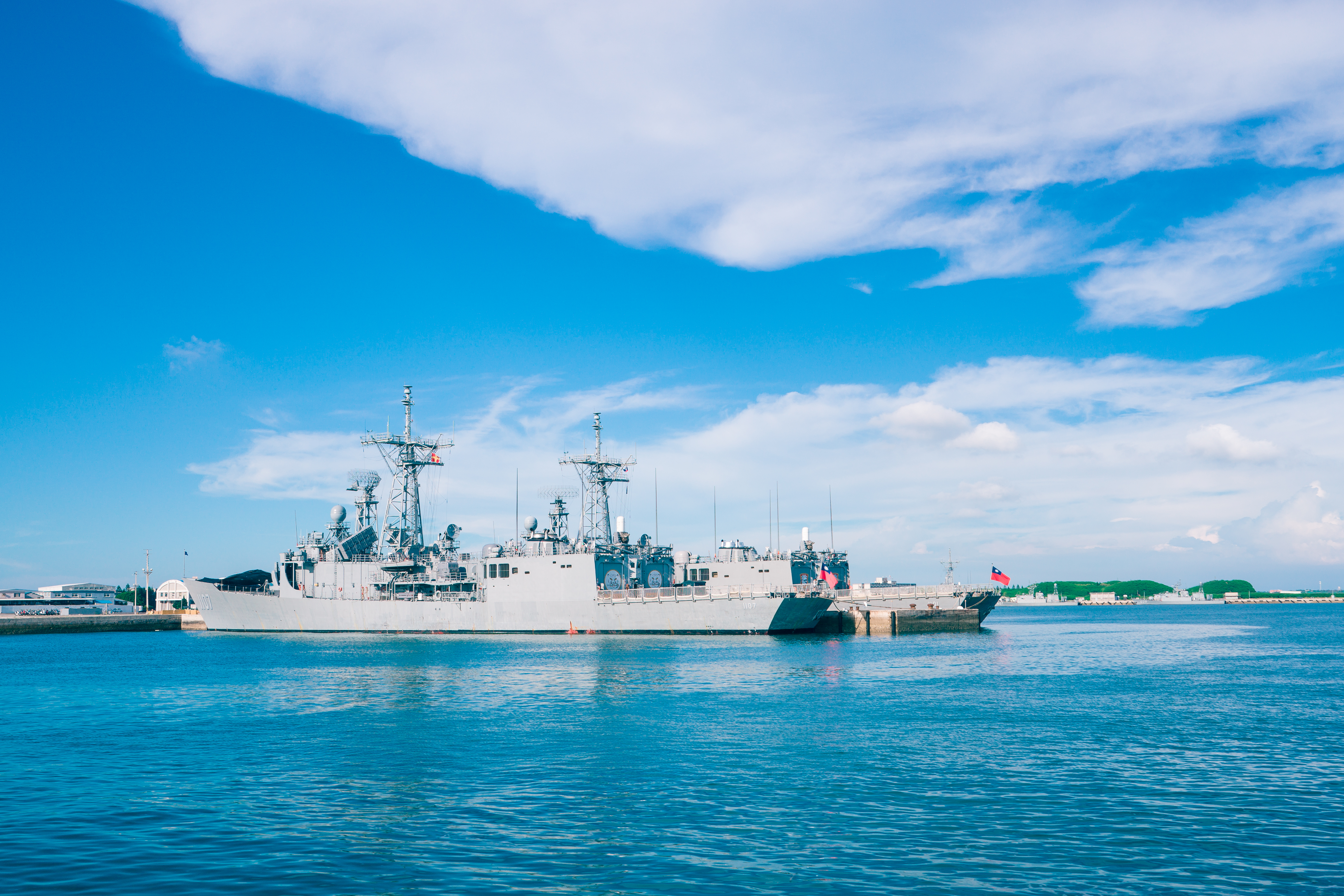 中文（台灣）: 中華民國海軍子儀軍艦（PFG2-1107）停泊海軍馬公基地測天島軍港。